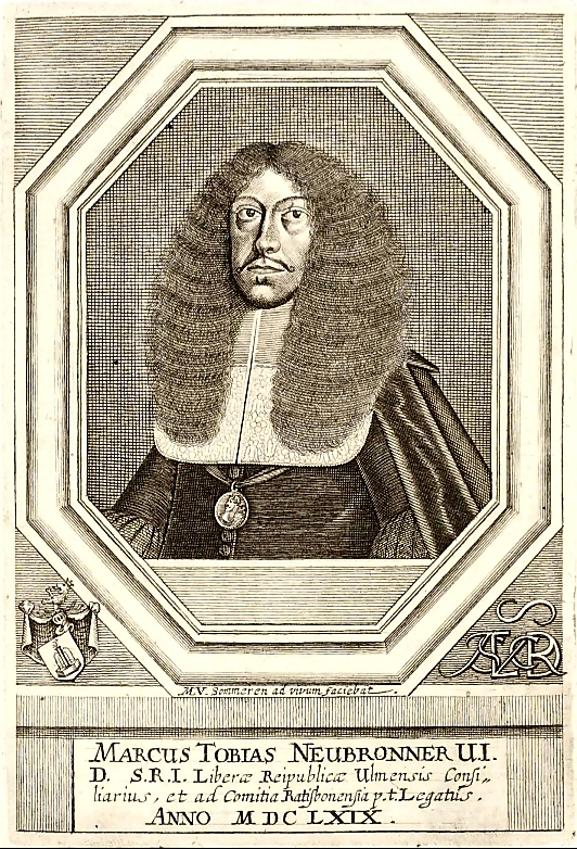 Marcus (Marx) Tobias Neubronner (* 4. Januar 1631 in Ulm; gest. 13. April 1703 in Ulm), Jurist, Magistrat und Diplomat in Ulm. Studierte zu Straßburg, 1662 Ratskonsulent, 1669 Reichstagsgesandter nach Regensburg, 1682 Stadtammann [d. i. Bürgermeister] und Scholarch in Ulm, Gesandter seiner Vaterstadt zu den schwäbischen Kreistagen, an den kaiserlichen und verschiedene Fürstenhöfe.